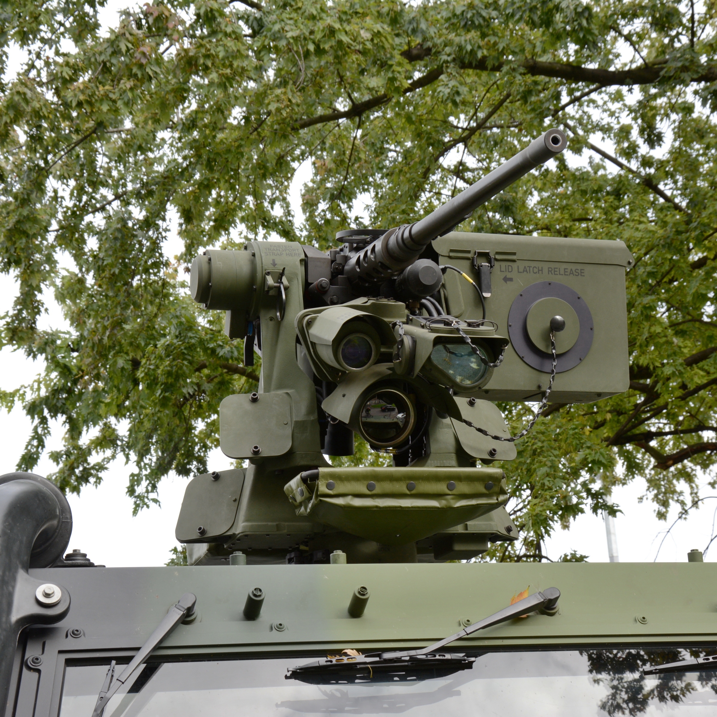 Lehké obrněné vozidlo IVECO 4x4 se zbraňovou stanicí M 151 A2 PROTECTOR s kulometem MI.50 M2HB QCB z výzbroje Armády České republiky. Vystaveno 14. října 2014 při příležitosti oslav 95. výročí vzniku Generálního štábu AČR.